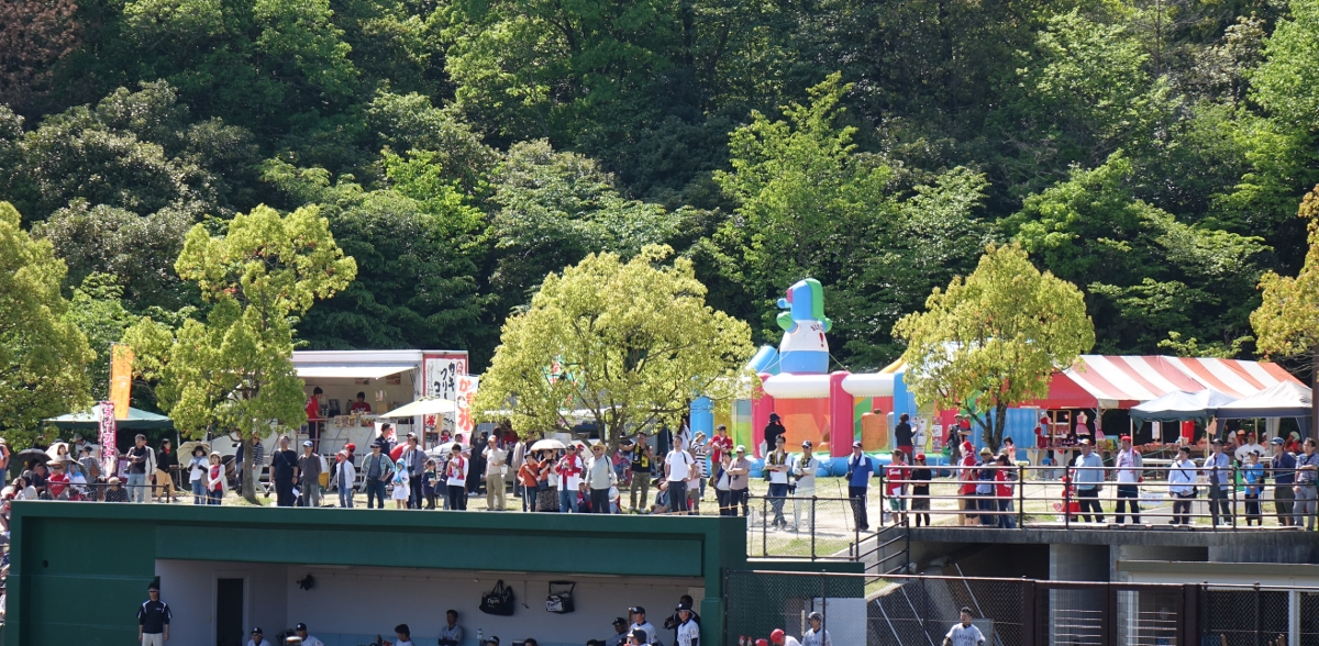 2015年5月2日、本人撮影